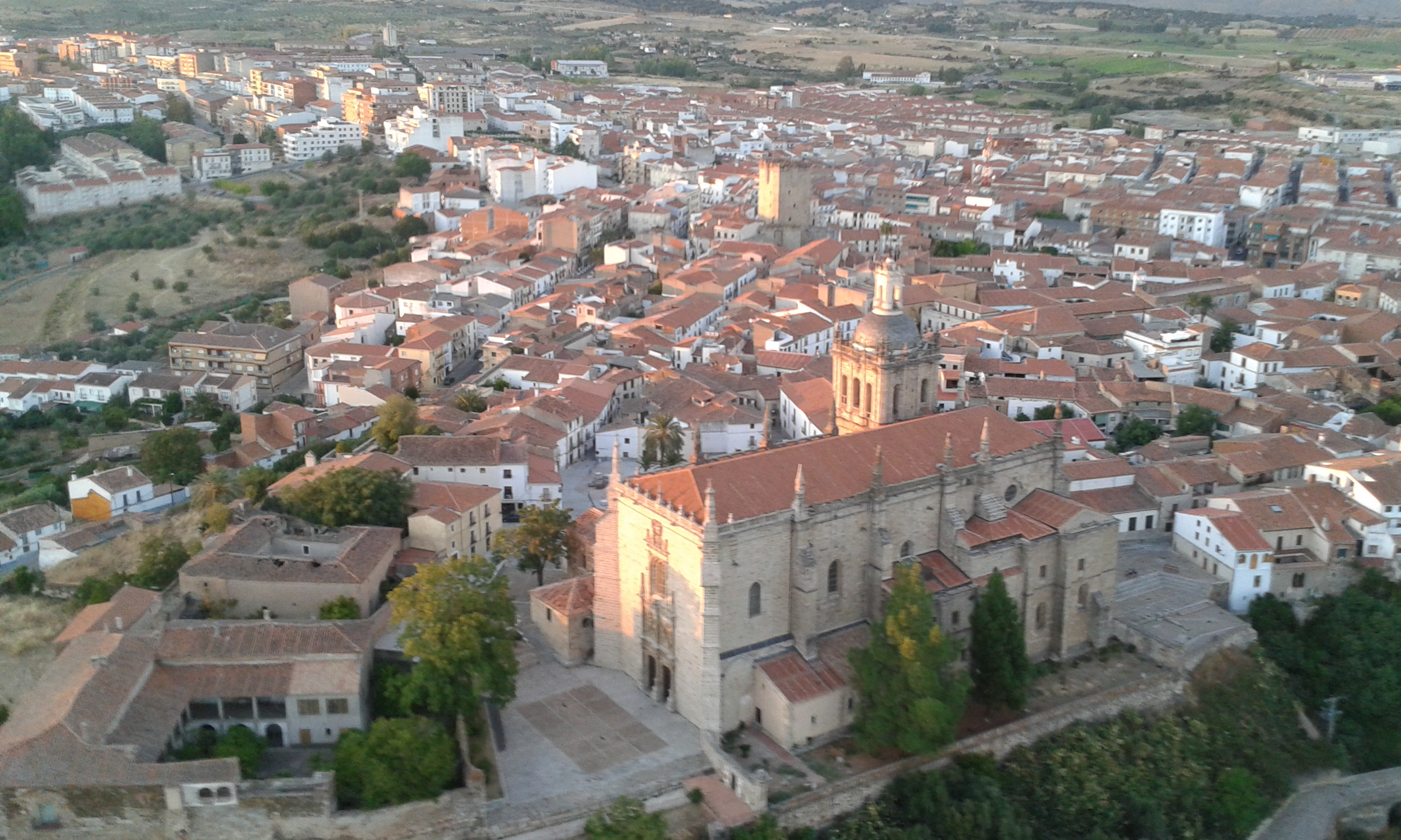 Vuelo realizado el 29 de agosto de 2014, con vistas a la ciudad de Coria